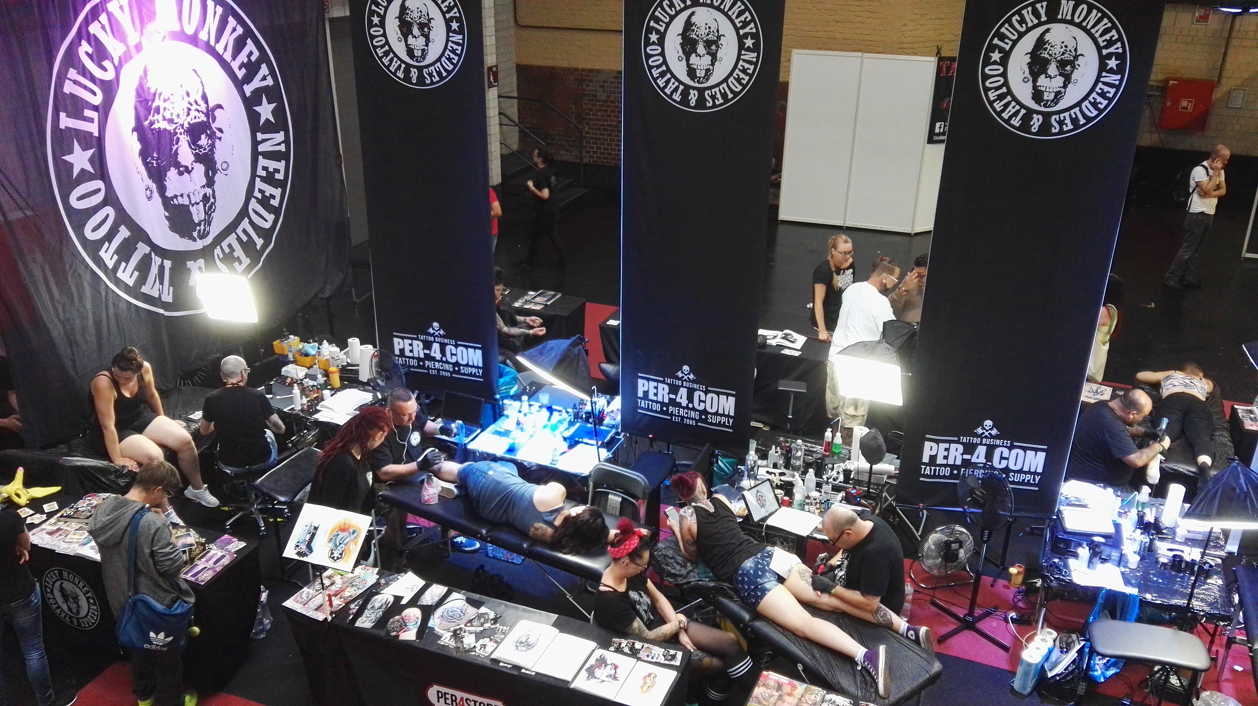 Stand bei der Tattoo convention in Arena Berlin im August 2017